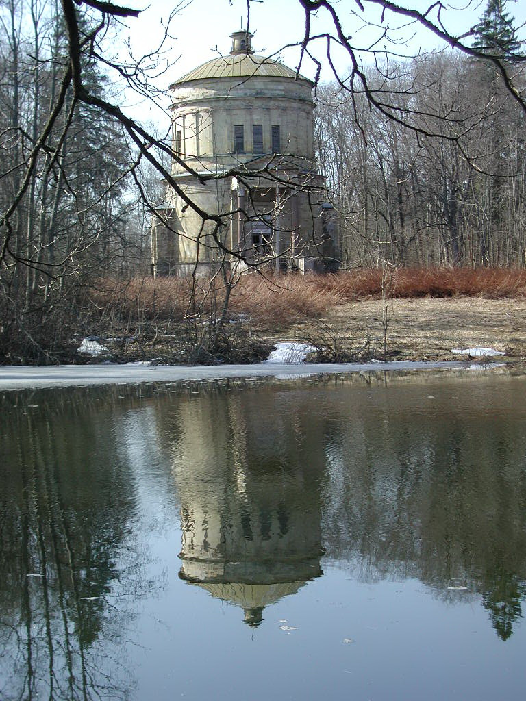 Каплица (Лен.область, Гатчинcкий р-н, посёлок Дружноселье)